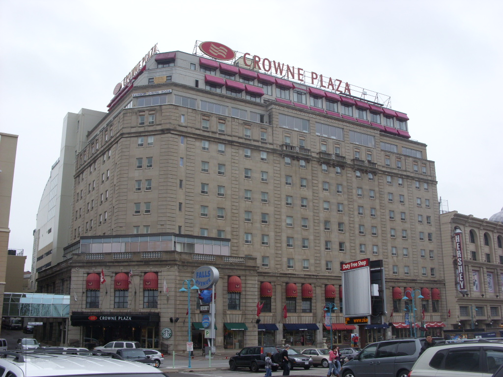 Niagara Region, Ontario